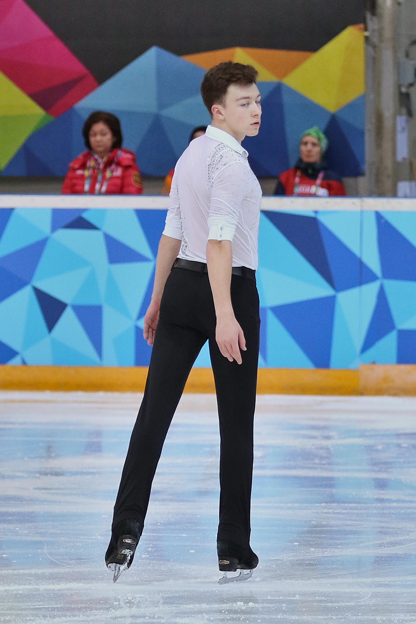 Lillehammer 2016 - Figure Skating Men Short Program - Dmitri Aliev